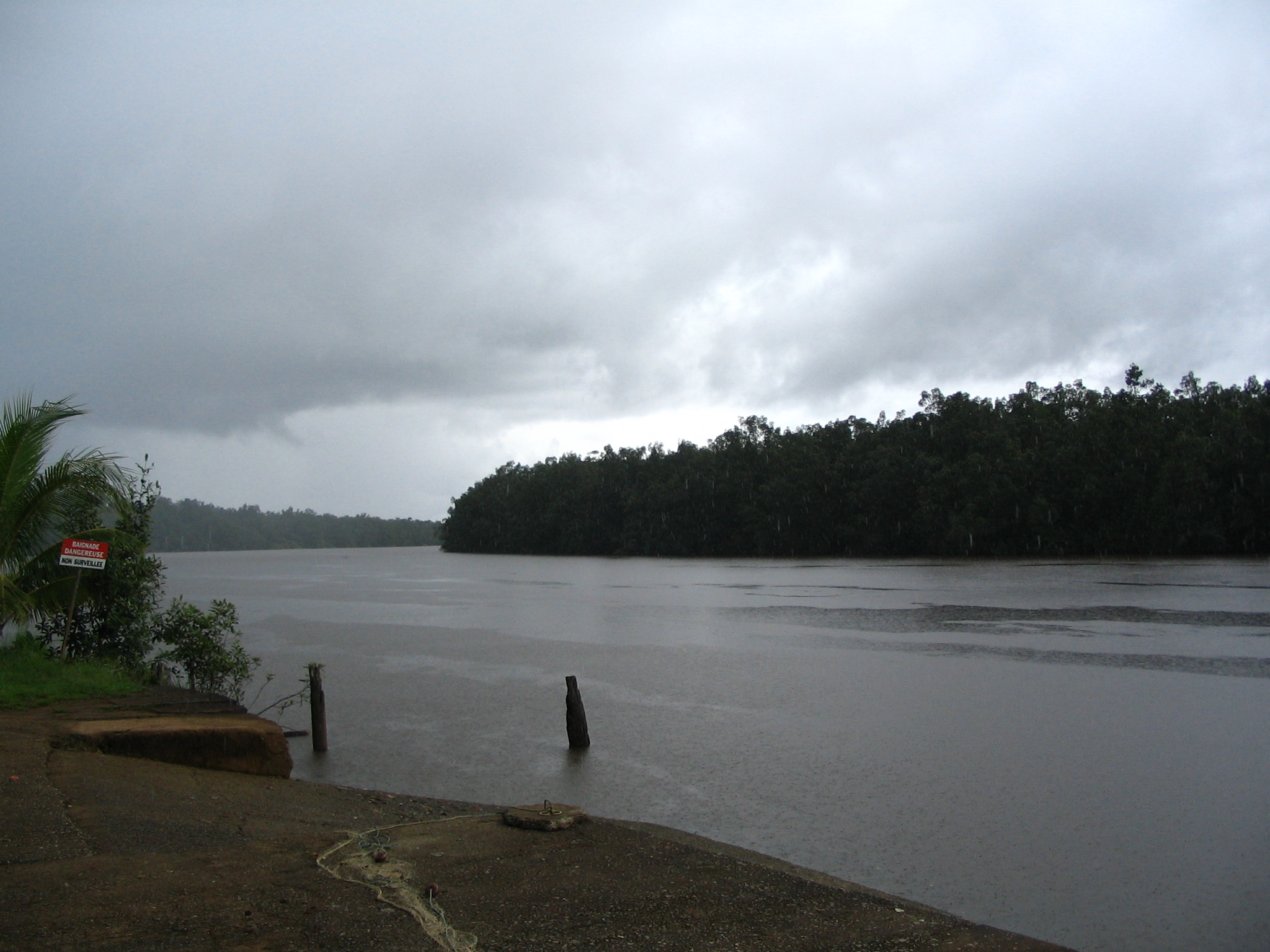 The Comté River on a rainy day at Roura, in French Guiana. Photo taken on 22 May 2005. Le fleuve Comté un jour pluvieux à Roura en Guyane française. Photo prise le 22 mai 2005.